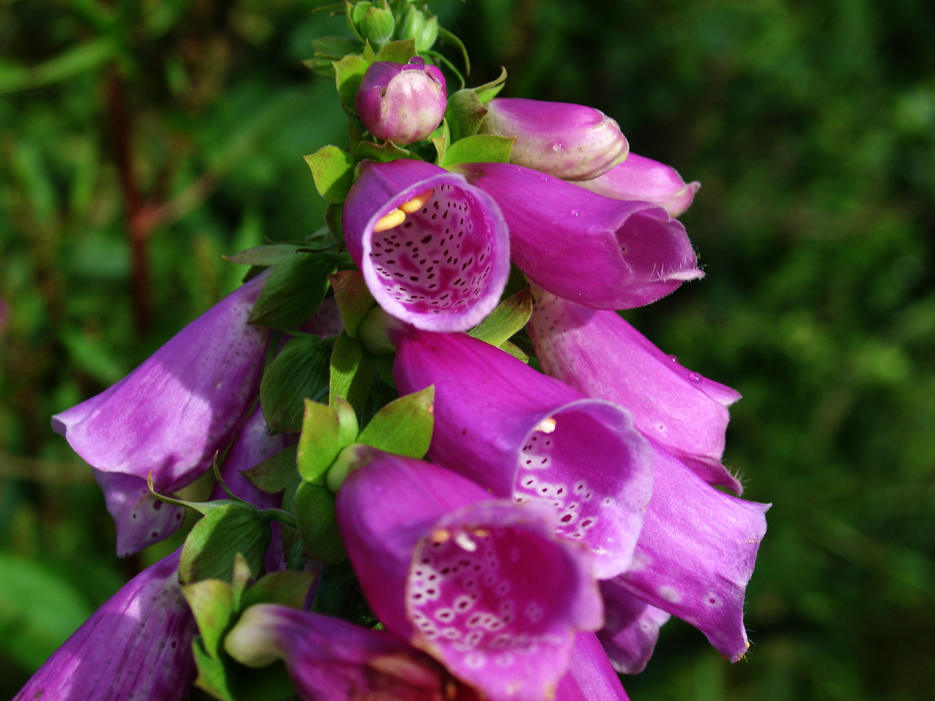 毛地黃（攝於大雪山）